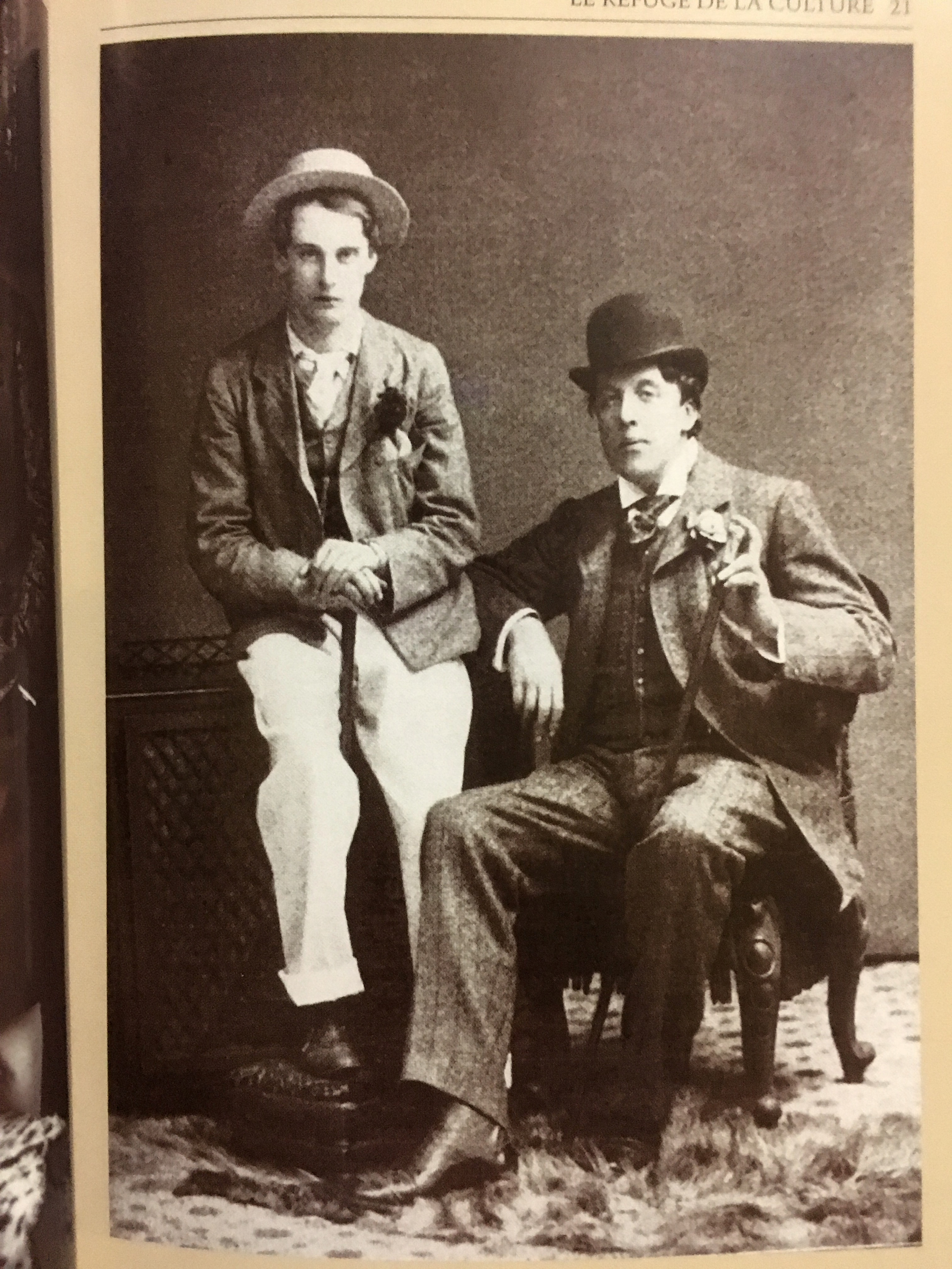 Oscar Wilde et lord Alfred Douglas dit «Bosie», vers 1894. — L’image (p. 21) dans le livre La longue marche des gays par Frédéric Martel, collection « Découvertes Gallimard / Culture et société » (nº 417), description à la page 122. Éditions Gallimard, 2002.